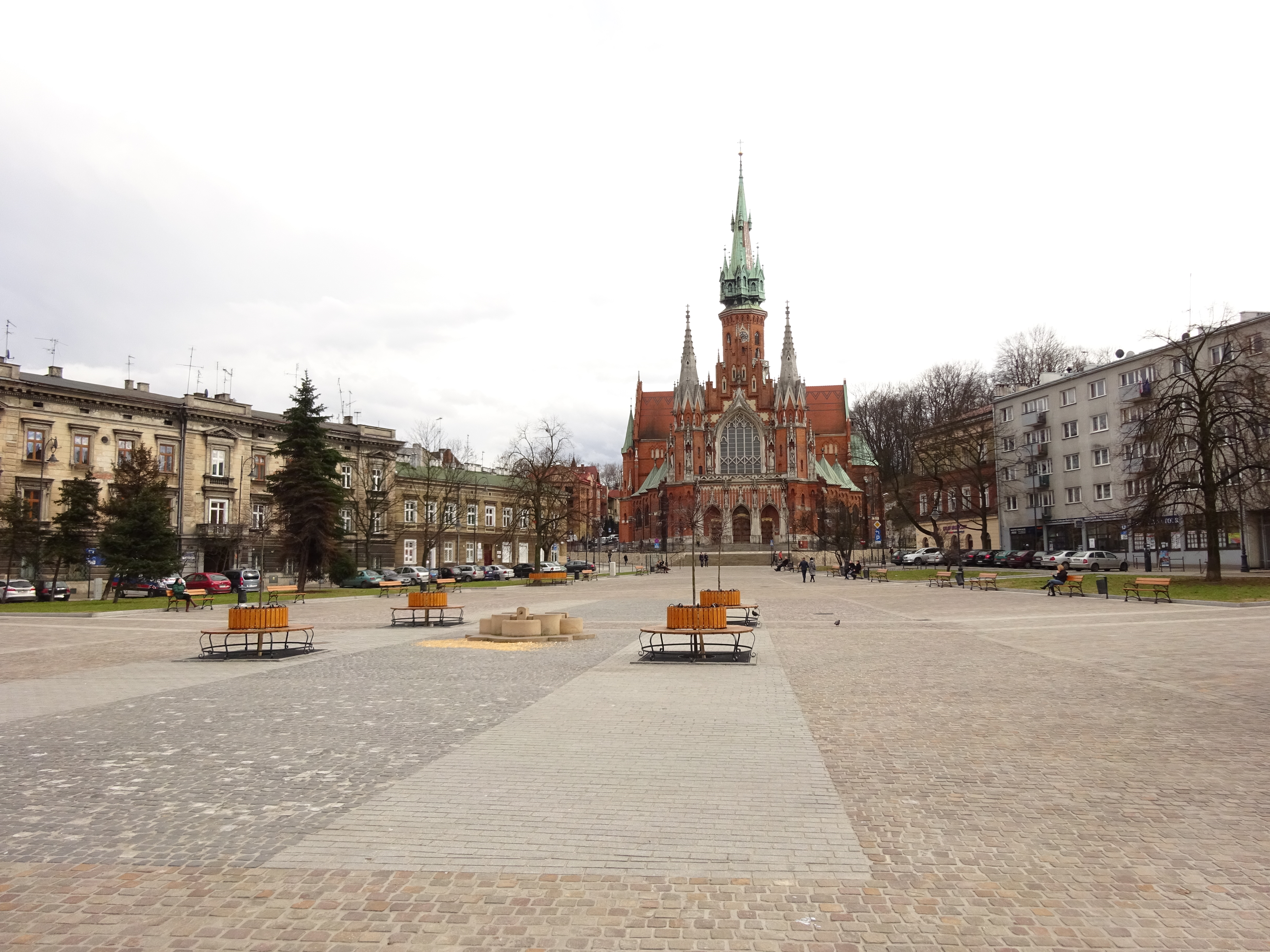 Rynek Podgórski w Krakowie. Widok od strony ulicy w kierunku Kościoła św. Józefa (na południe). Kraków, 2016.